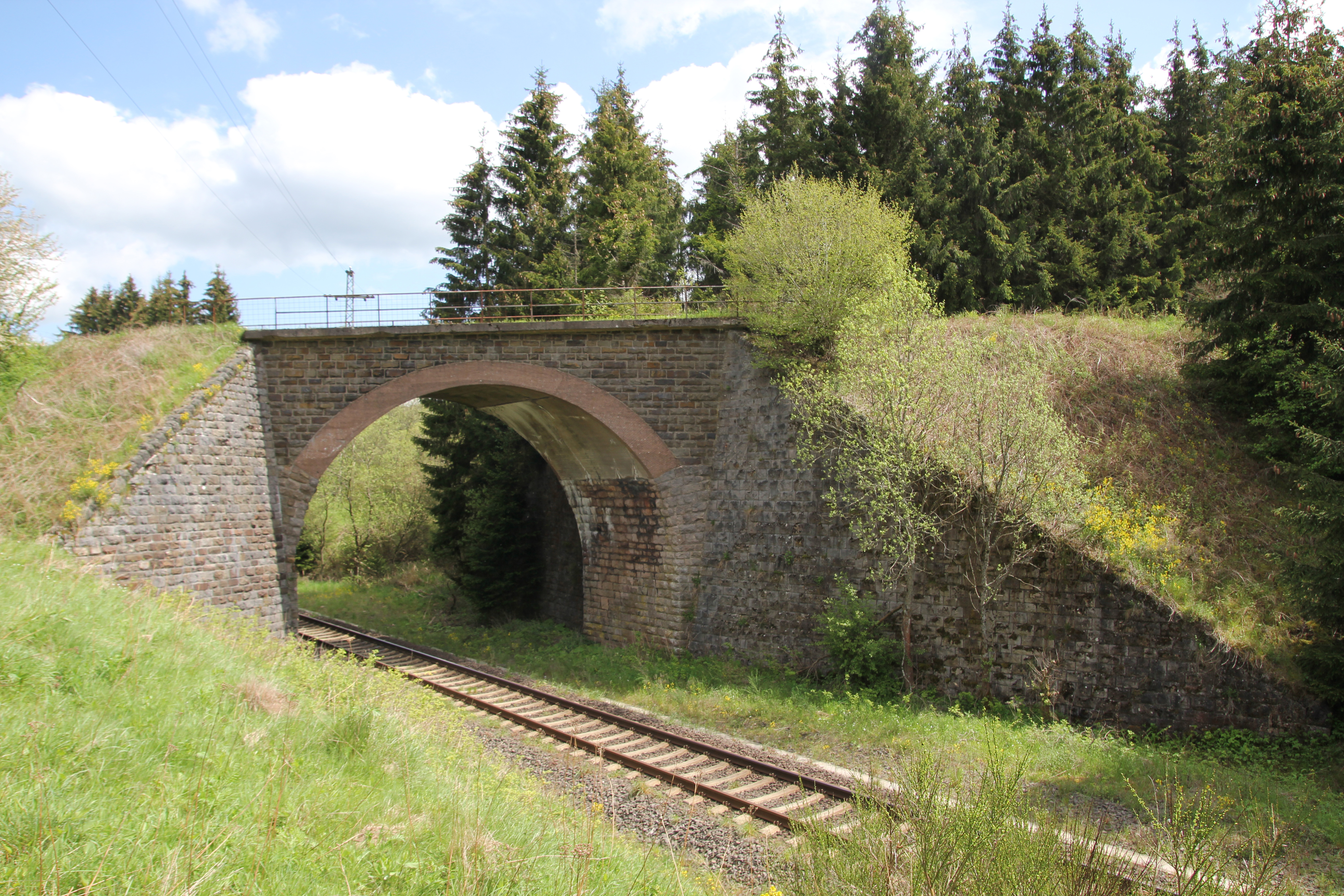 Denkmal 132 Dahlem This is a photograph of an architectural monument.